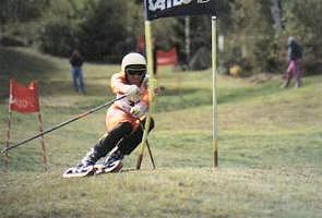 Sciatore d'erba in azione (slalom gigante)